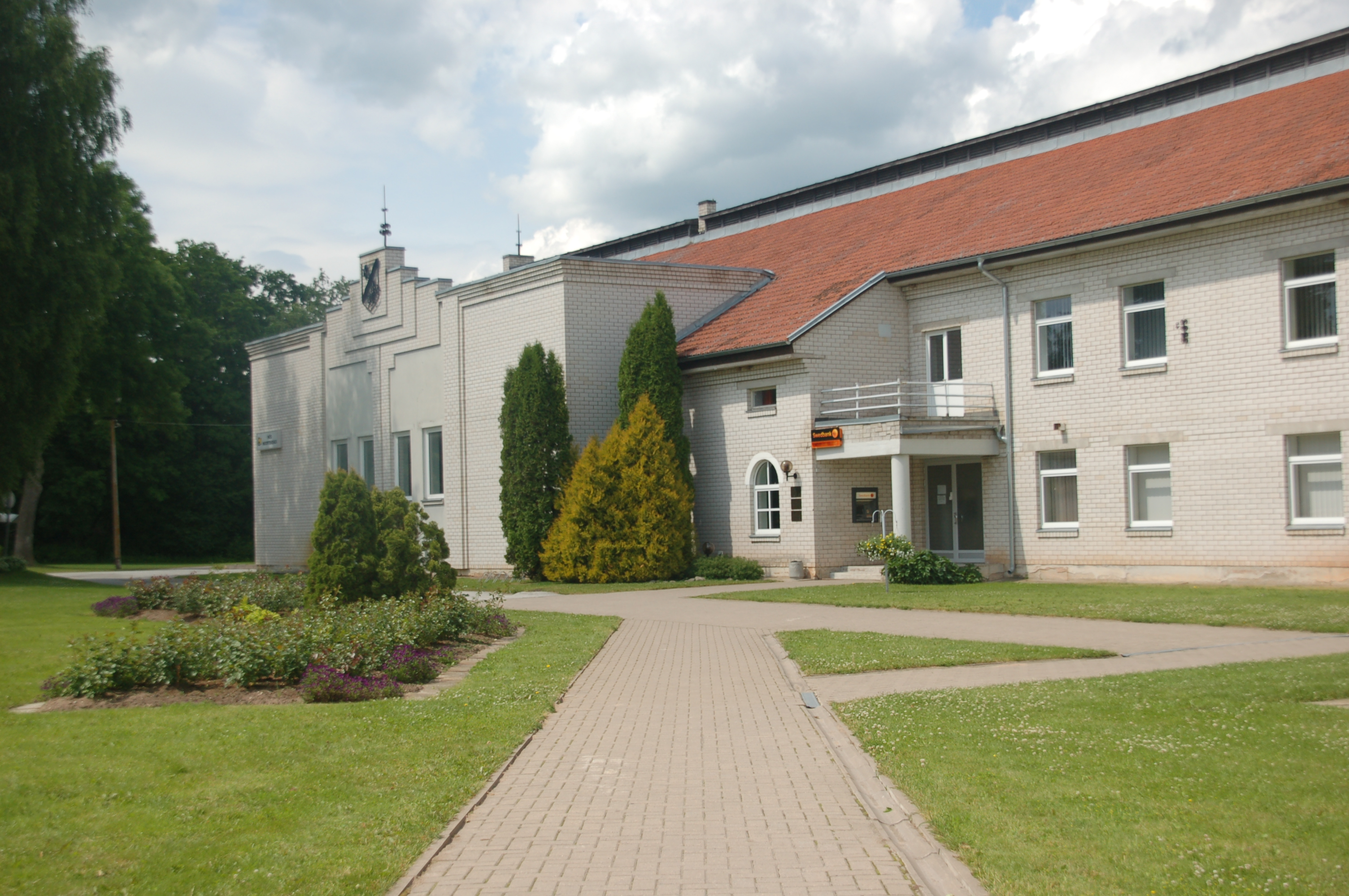 Nõo raamatukogu